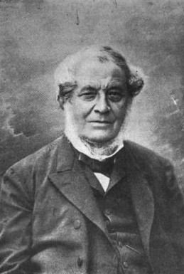 Robert Bunsen (* 30. März 1811 in Göttingen; † 16. August 1899 in Heidelberg)